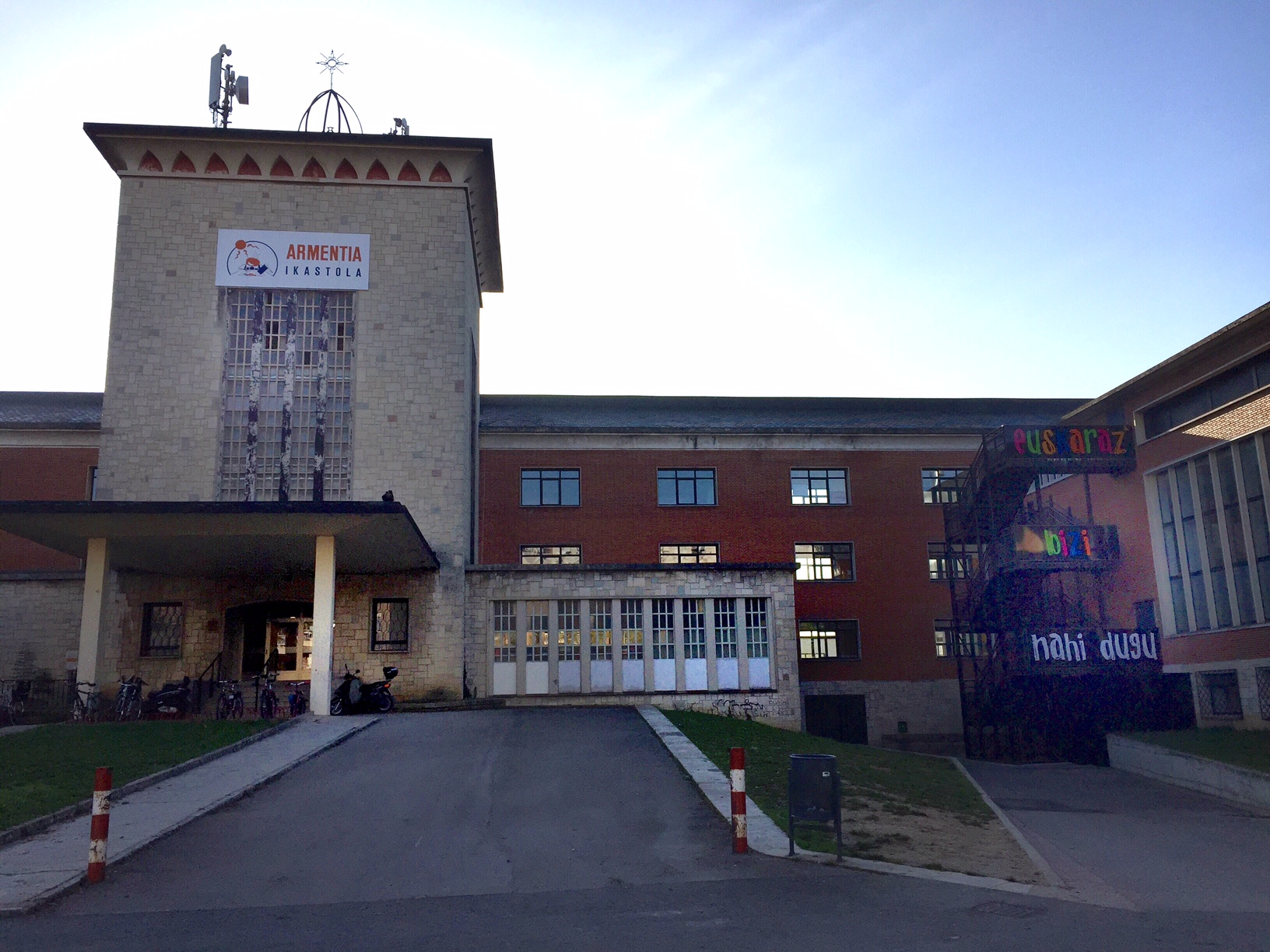 Armentia ikastola, Gasteiz